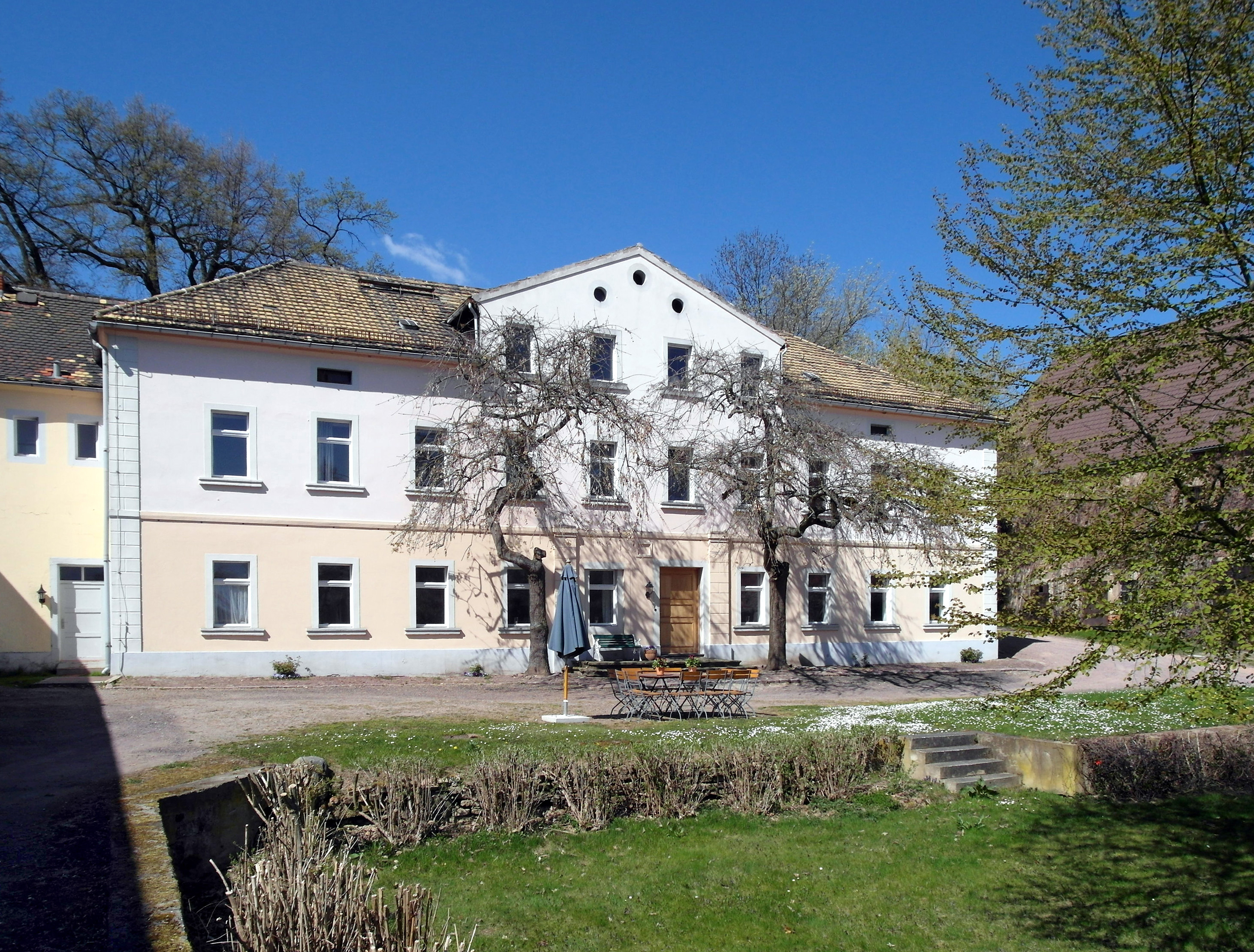 20.04.2015 04720 Gödelitz (Mochau): Gut Gödelitz, Gödelitz 1. Sitz des "Ost-West-Forum Gut Gödelitz". [SAM9971.JPG]20150420700DR.JPG(c)Blobelt